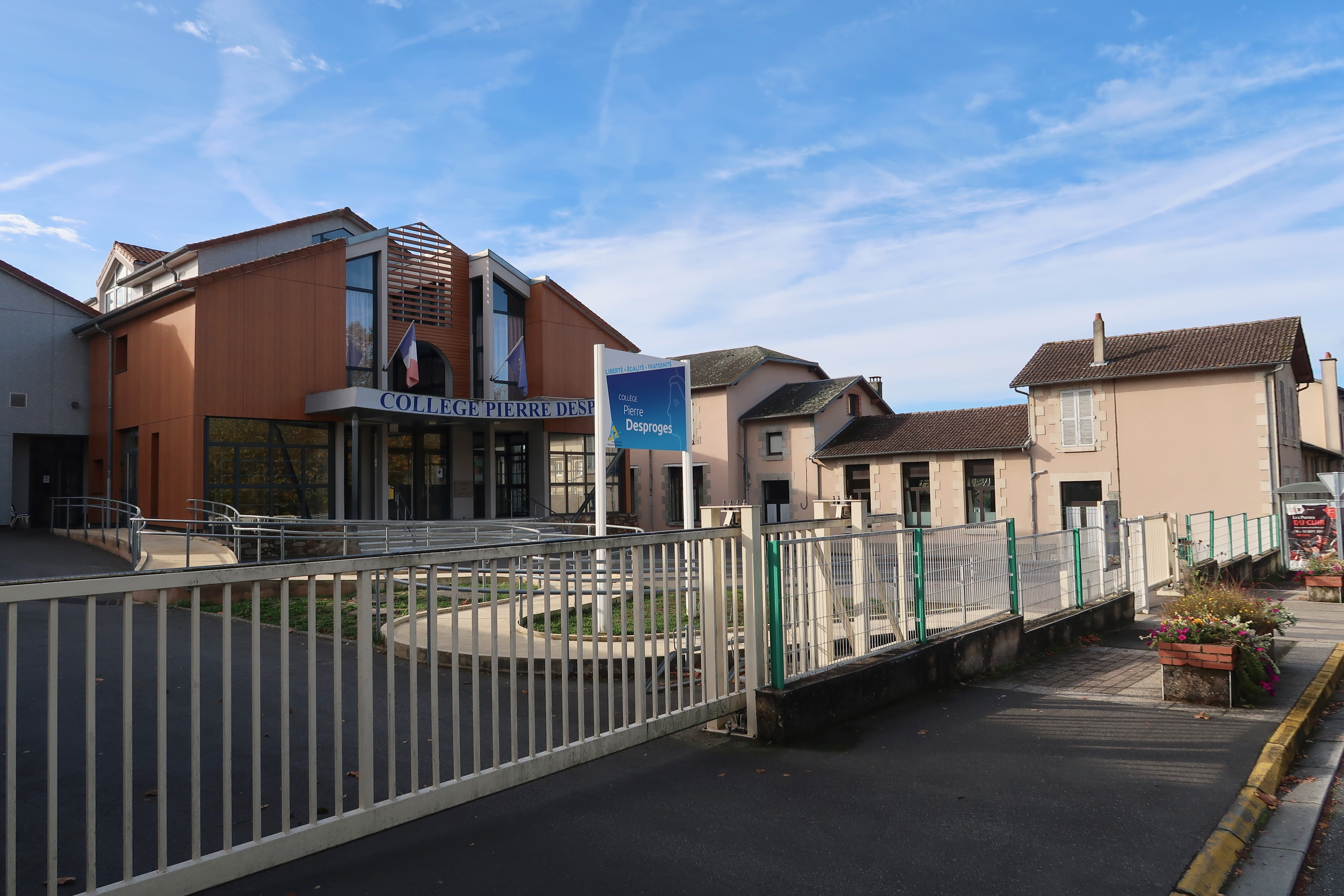 Collège Pierre-Desproges, place Salvador Allende à Châlus (Haute-Vienne).